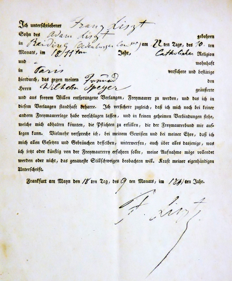 Liszt Ferenc szabadkőműves jelentkezése